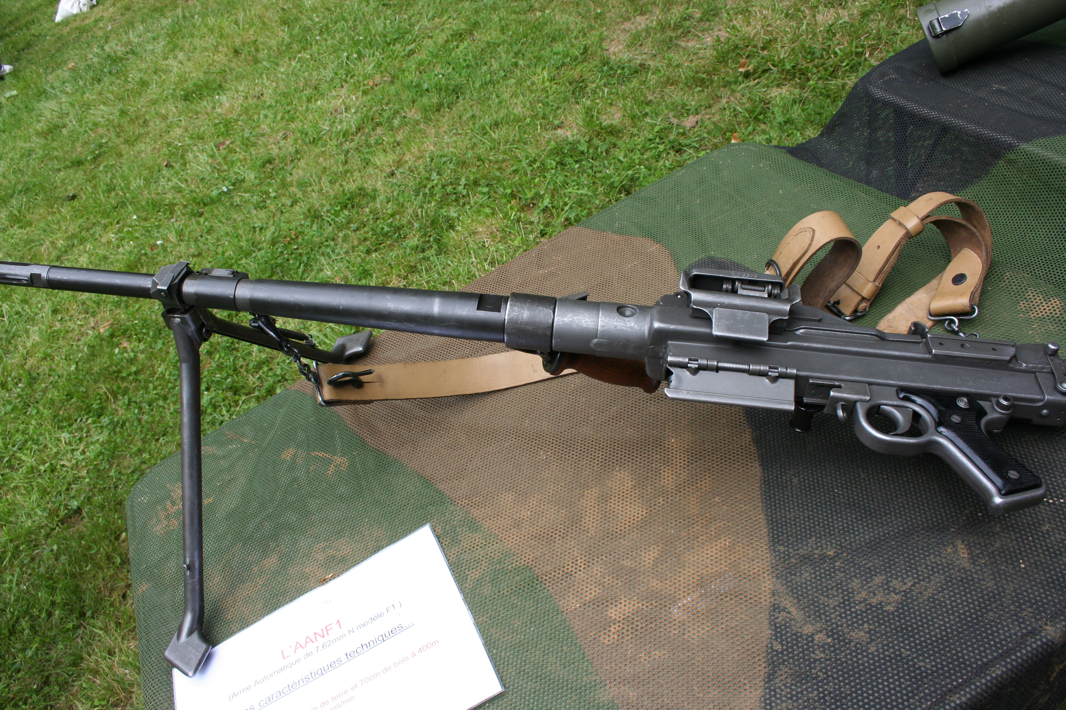 Mitrailleuse ANF1.